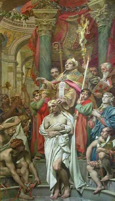 Joseph Blanc: Le baptême de Clovis, env. 1880-1899, toile marouflée, Panthéon de Paris